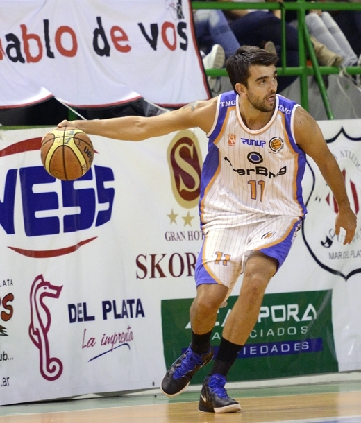 Franco en el Once Unidos